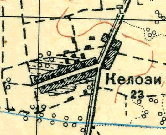 Топографическая карта Ленинградской области, квадрат О-35-24-Б-а (Переярово), деревня Келози